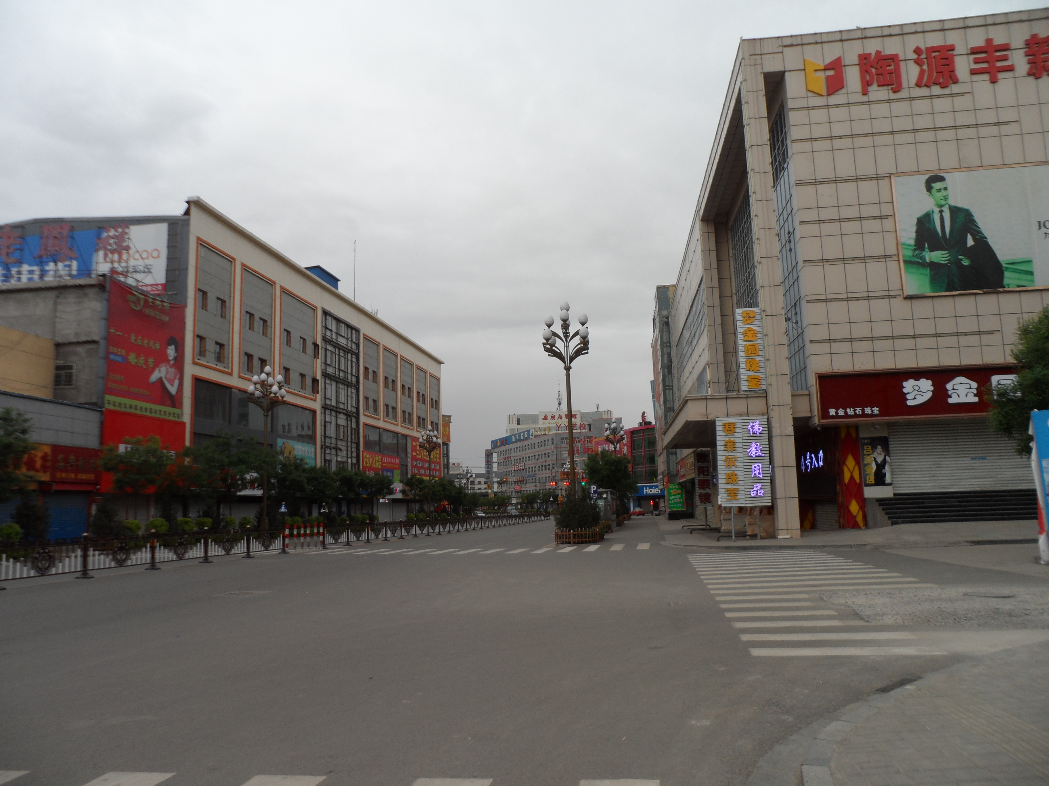 山西平遥县